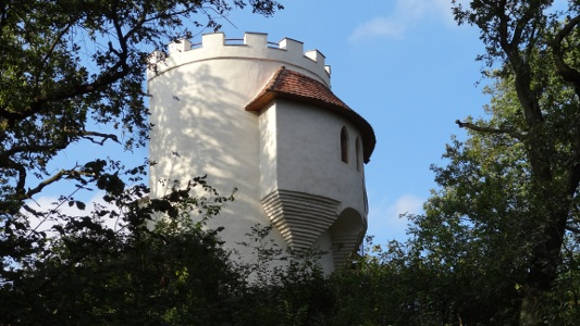 Die Wallwitzburg in Dessau von der Elbseite aus gesehen, nach der Rekonstruktion durch den Wallwitzburg Dessau e. V., 2011 Man erkennt deutlich den angebauten Erker, der den Zugang zum Turmzimmer ermöglicht.